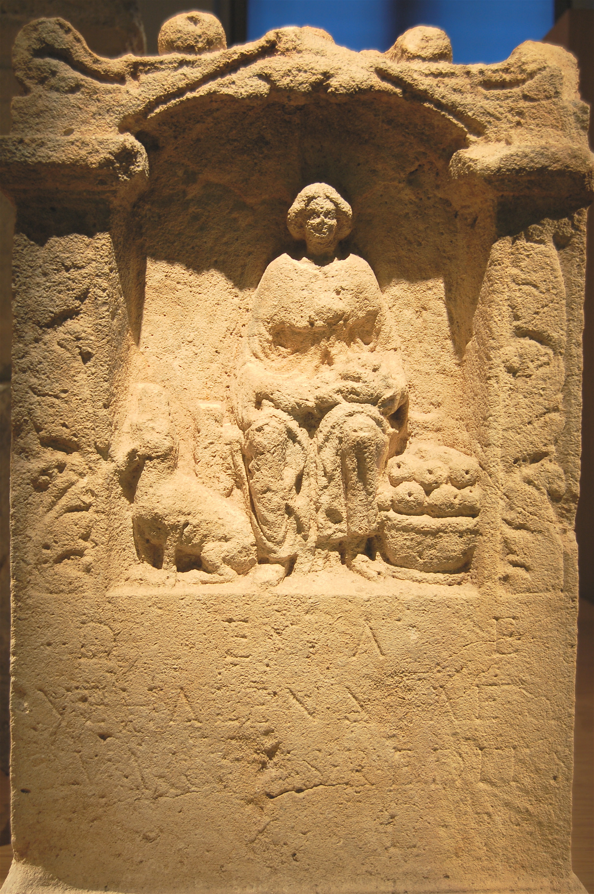 Inscripción votiva romana procedente de Colijnsplaat (Países Bajos) correspondiente con AE 1973, 363: Deae / Nehalenniae / Quartius Reditus / v(otum) s(olvit) l(ibens) m(erito)